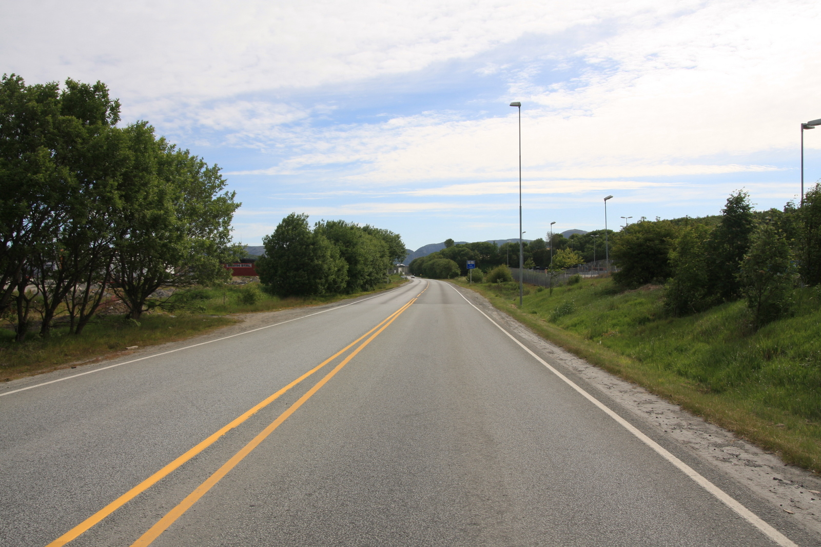 Fylkesvei 349 Løwenstrasse